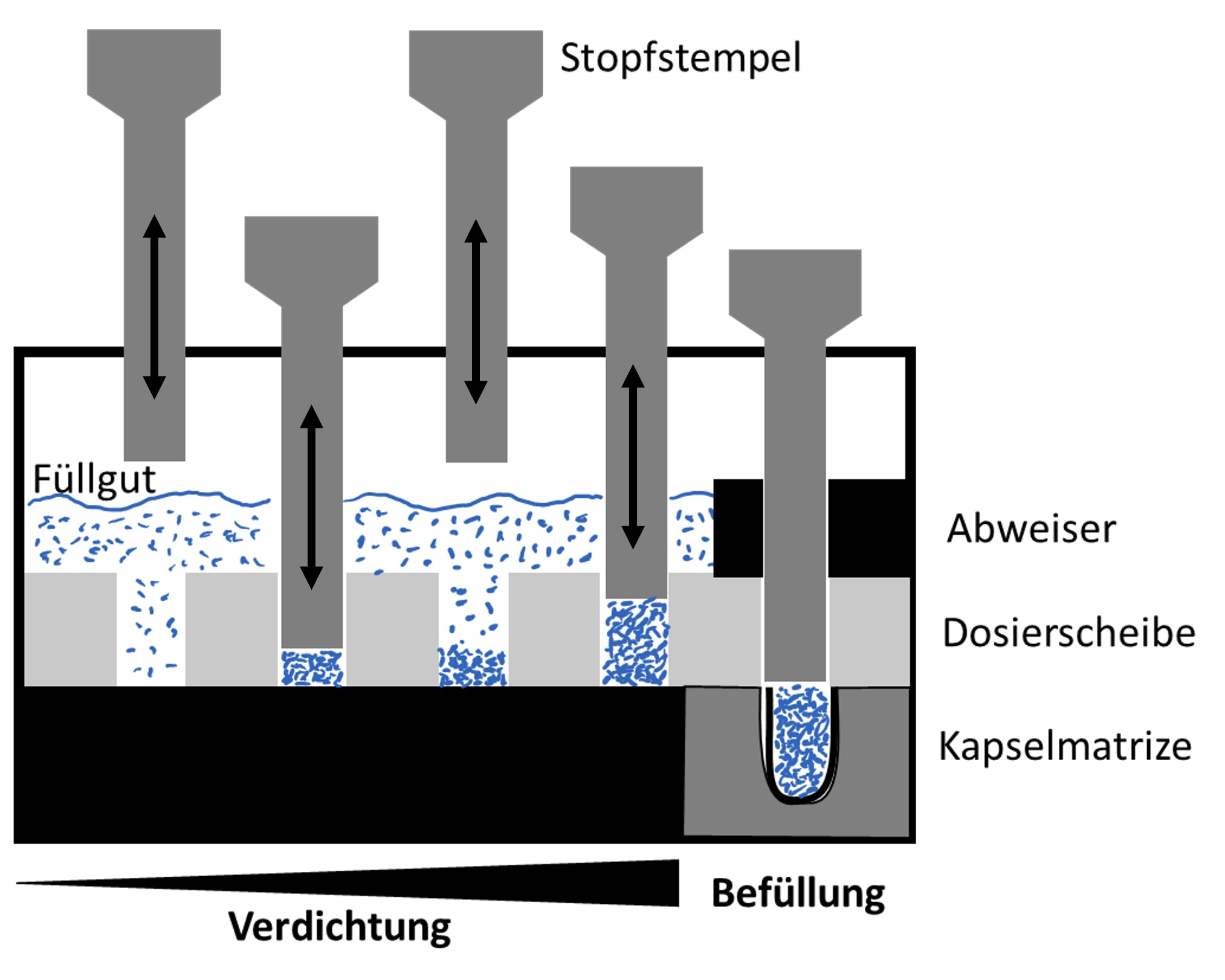 Der Stopfverfahren ist eine Methode um Kapseln in der pharmazeutischen Industrie zu befüllen und das Füllgut zu dosieren.